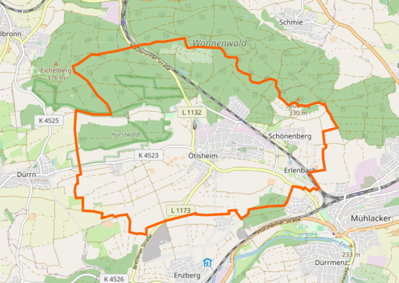 Gemarkung Ötisheim, mit den Teilorten Corres, Schönenberg, Erlenbach und die Höfe Haldenhof und Reithof